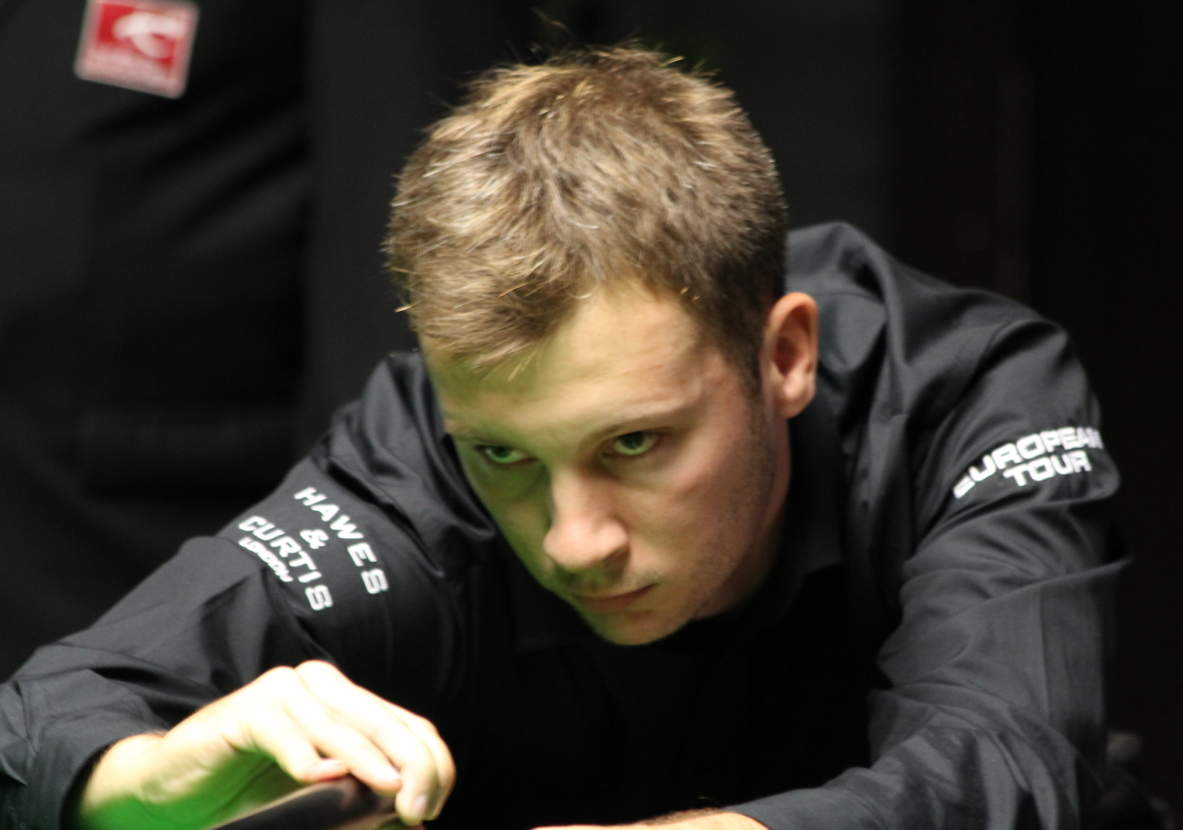 Zak Surety beim Paul Hunter Classic 2014